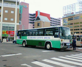 青森市営バス観光貸切塗色（観光貸切車）青森駅にて